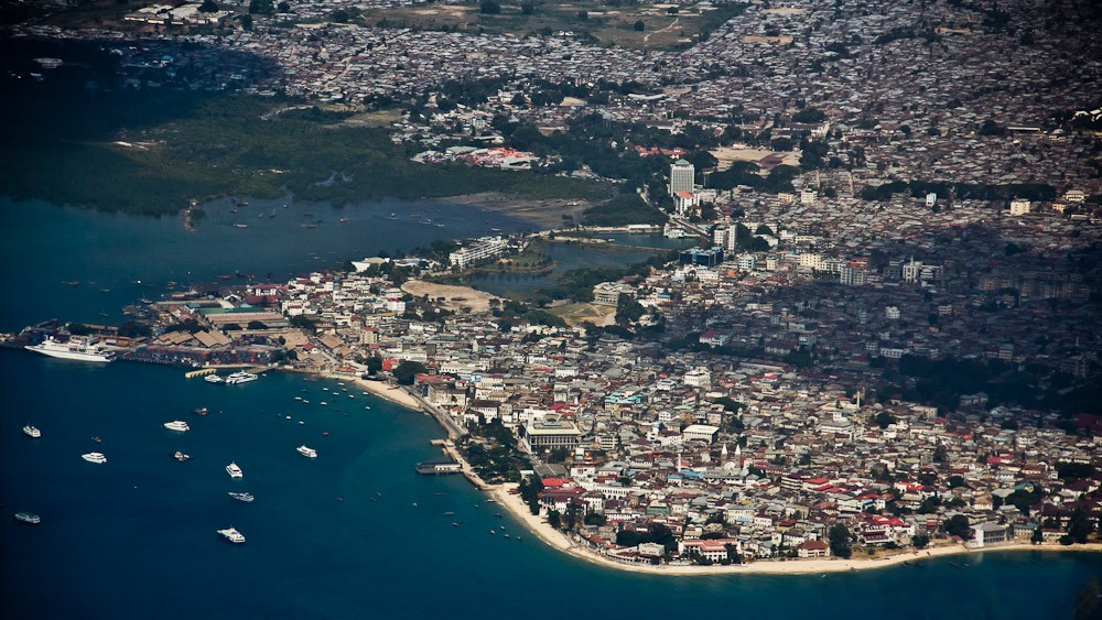 Malawi Rd, Zanzibar Town, Tanzania